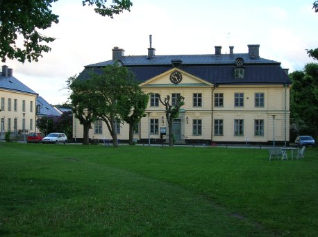 Barnängens gård, framsidan, juni 2005 fotograf : Jordgubbe. Public Domain